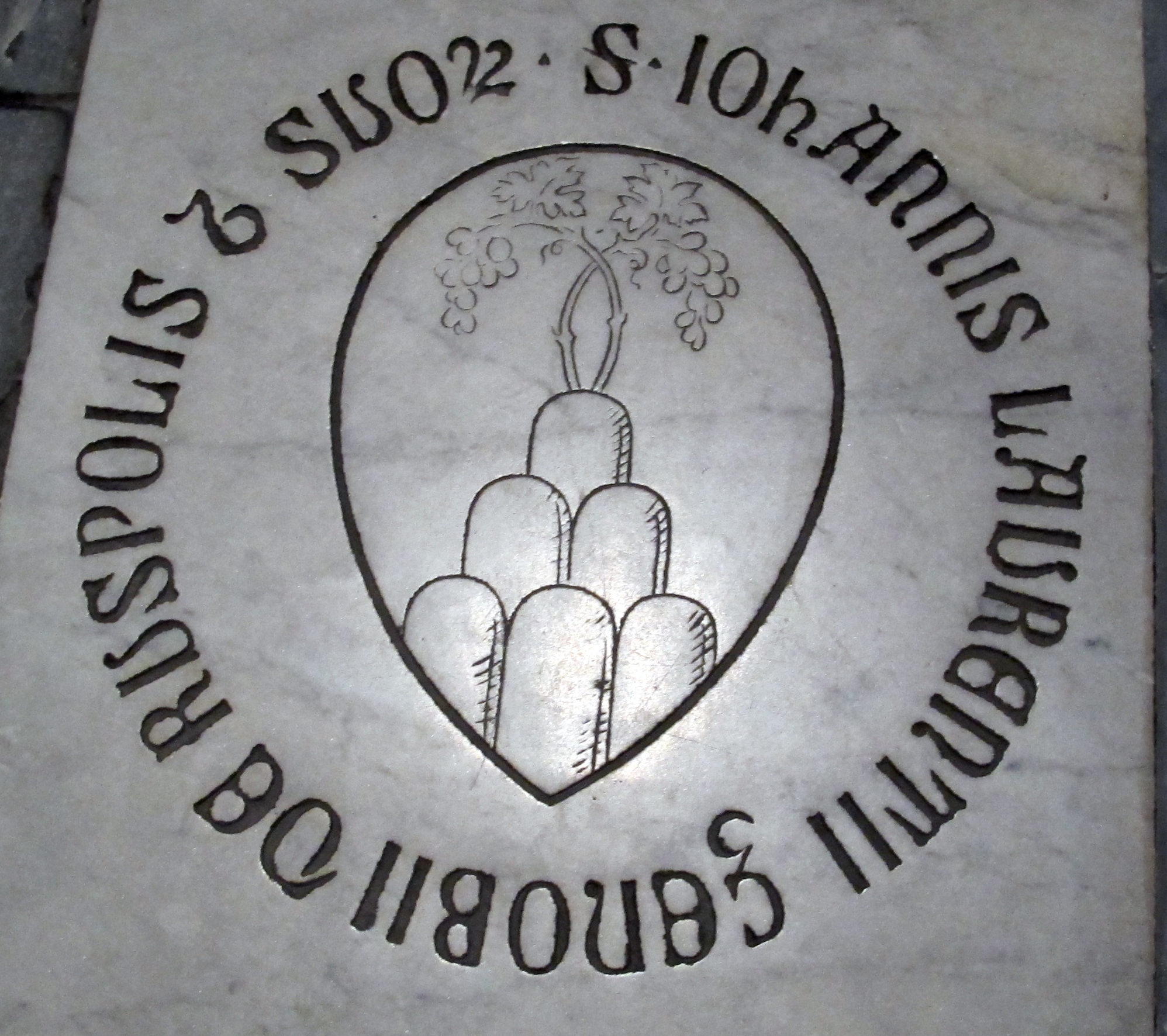 Smn, navata sx, tombe terragne 81 ruspoli